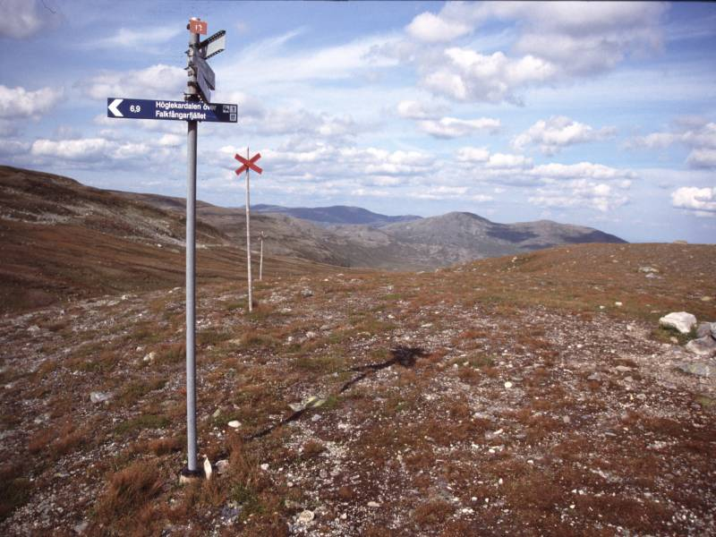 Im Oviksfjäll in Jämtland, Schweden; Oviksfjäll in Jämtland, Sweden